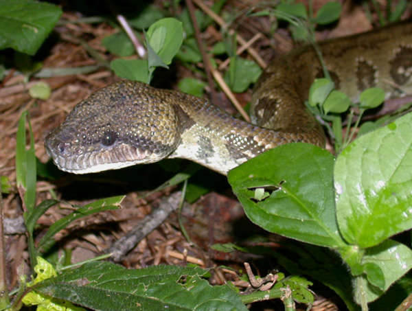 Madagascar Tree Boa (Sanzinia madagascariensis)